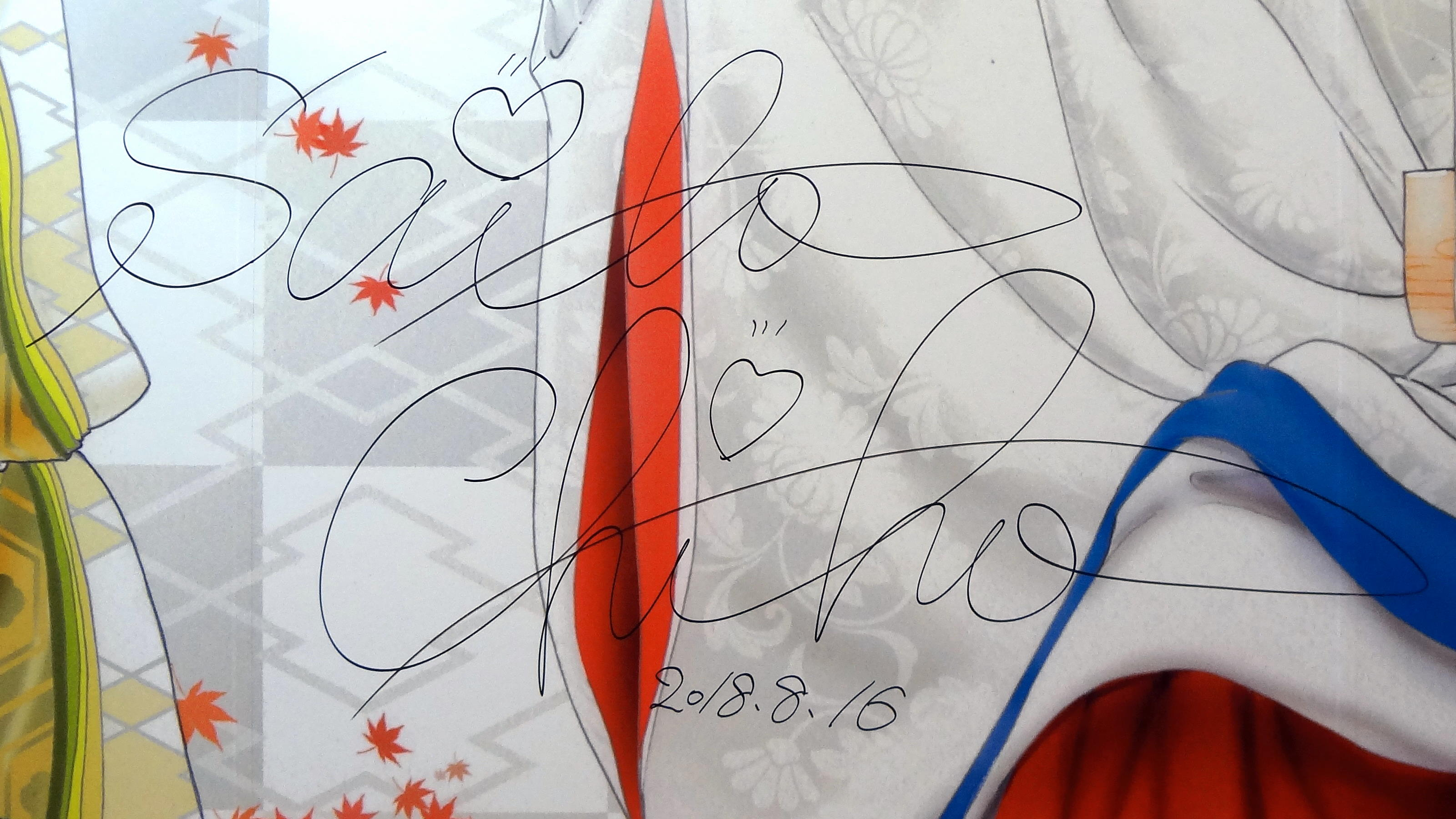 2018年（第19屆）漫畫博覽會，長鴻出版社攤位外牆，2018年8月16日齊藤千穗的簽名。